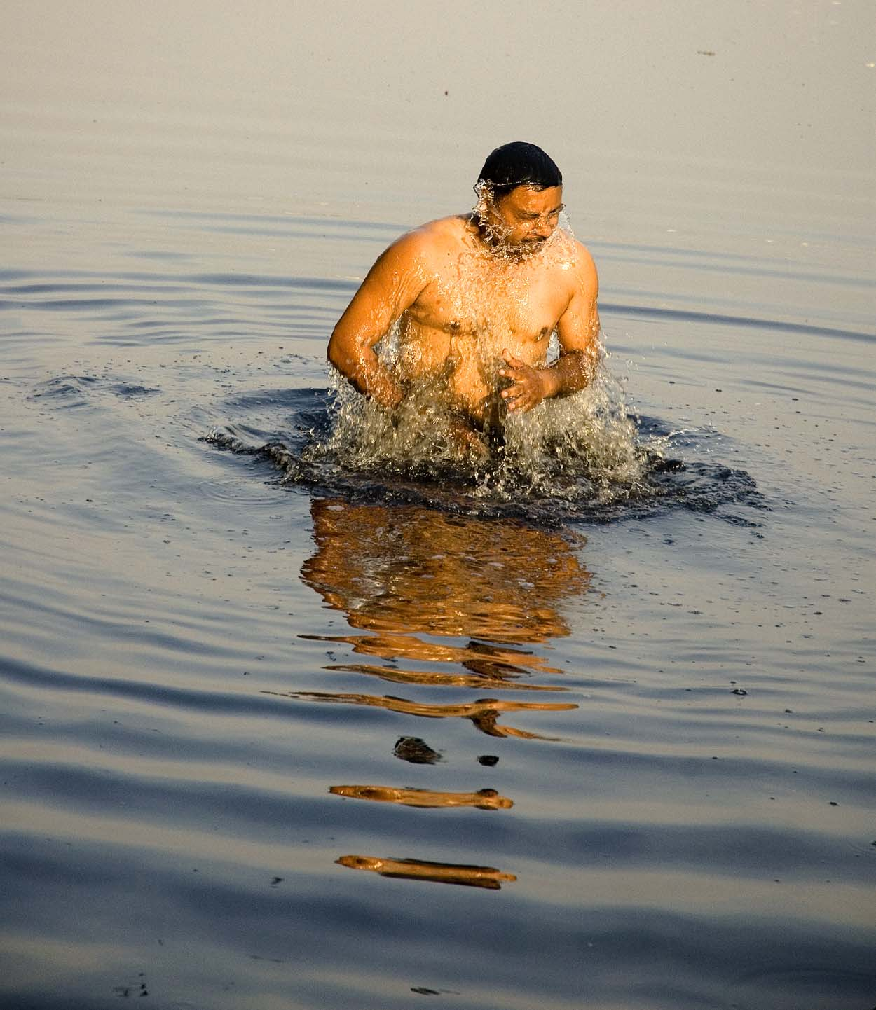 Morning Dip in Yamuna